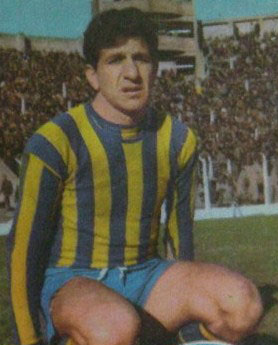 José Sasía